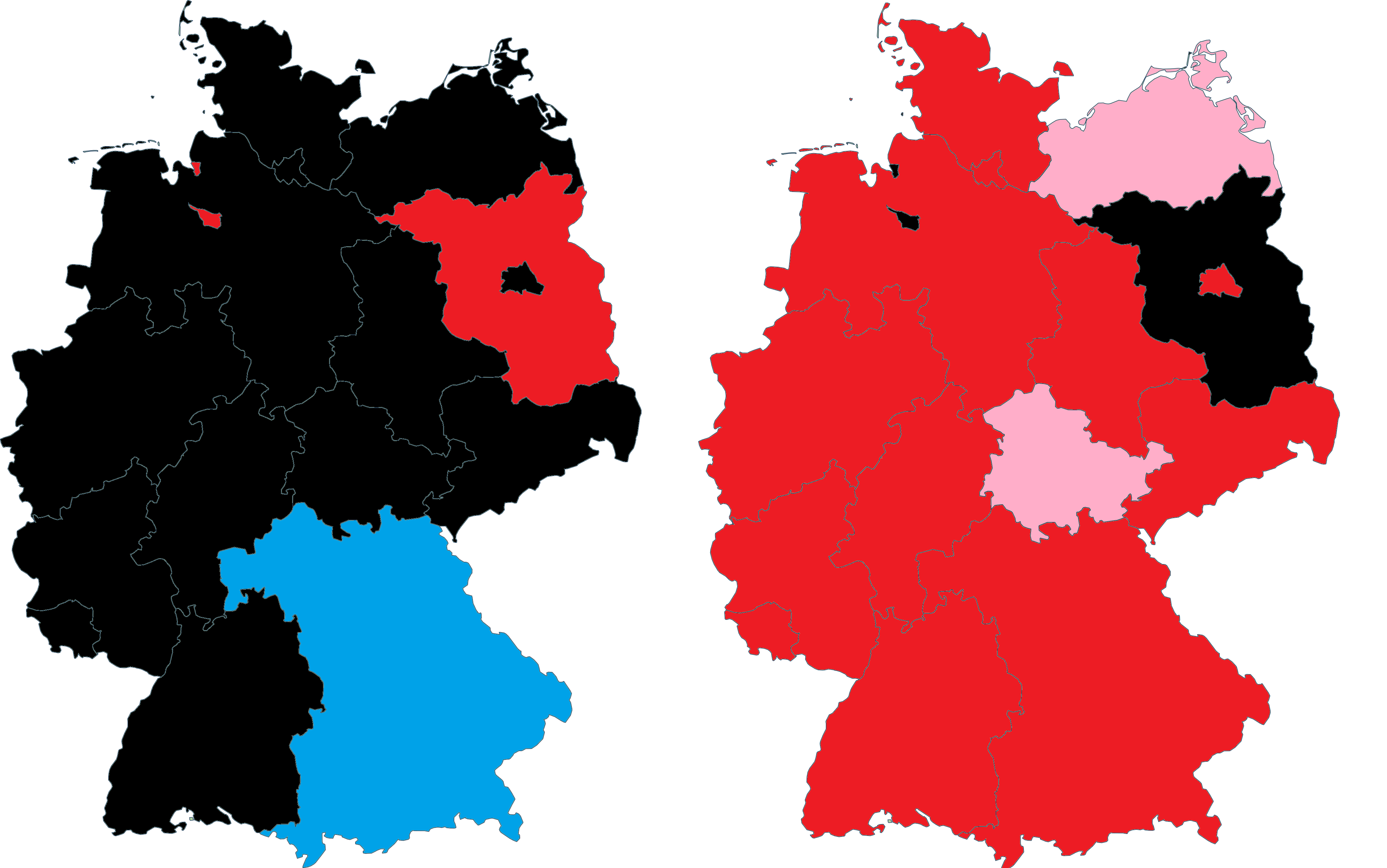 Elections européennes de 1999 en Allemagne, parti arrivé en tête par Land (1ère carte), parti arrivé en seconde position (2ème carte) Rouge : SPD Noir : CDU Bleu : CSU Rose :PDS